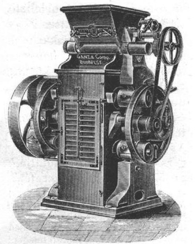 A Ganz gyár Mechwart András által tervezett hengerszéke.